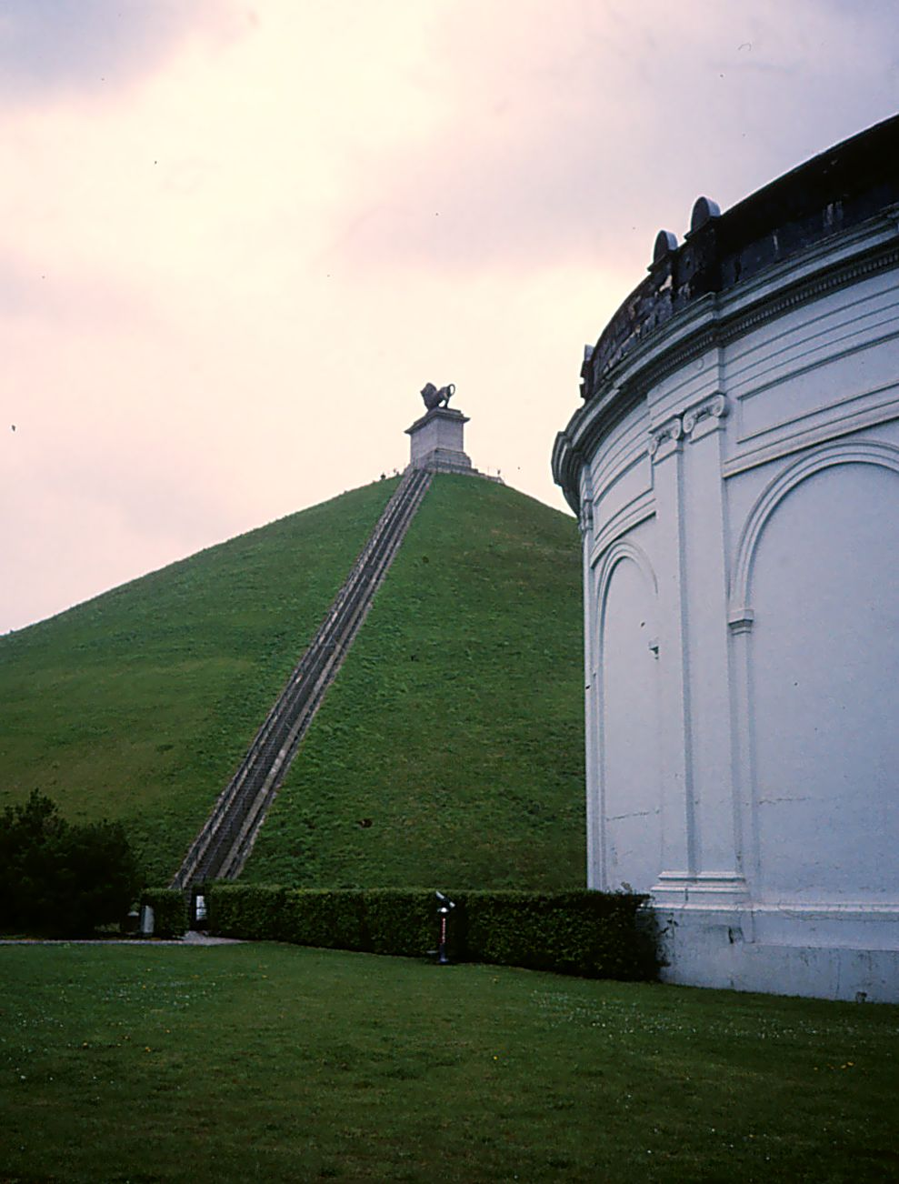 Højen med den store bronzeløve i Waterloo, med en del af besøgscentret til højre. 29. april 1997.